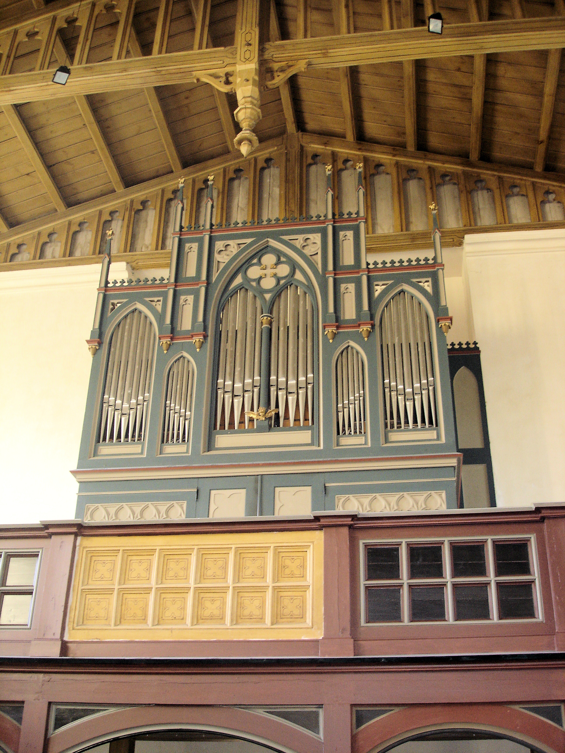 Südseite der Peter-Pauls-Kirche in Zingst, Landkreis Nordvorpommern, Mecklenburg-Vorpommern